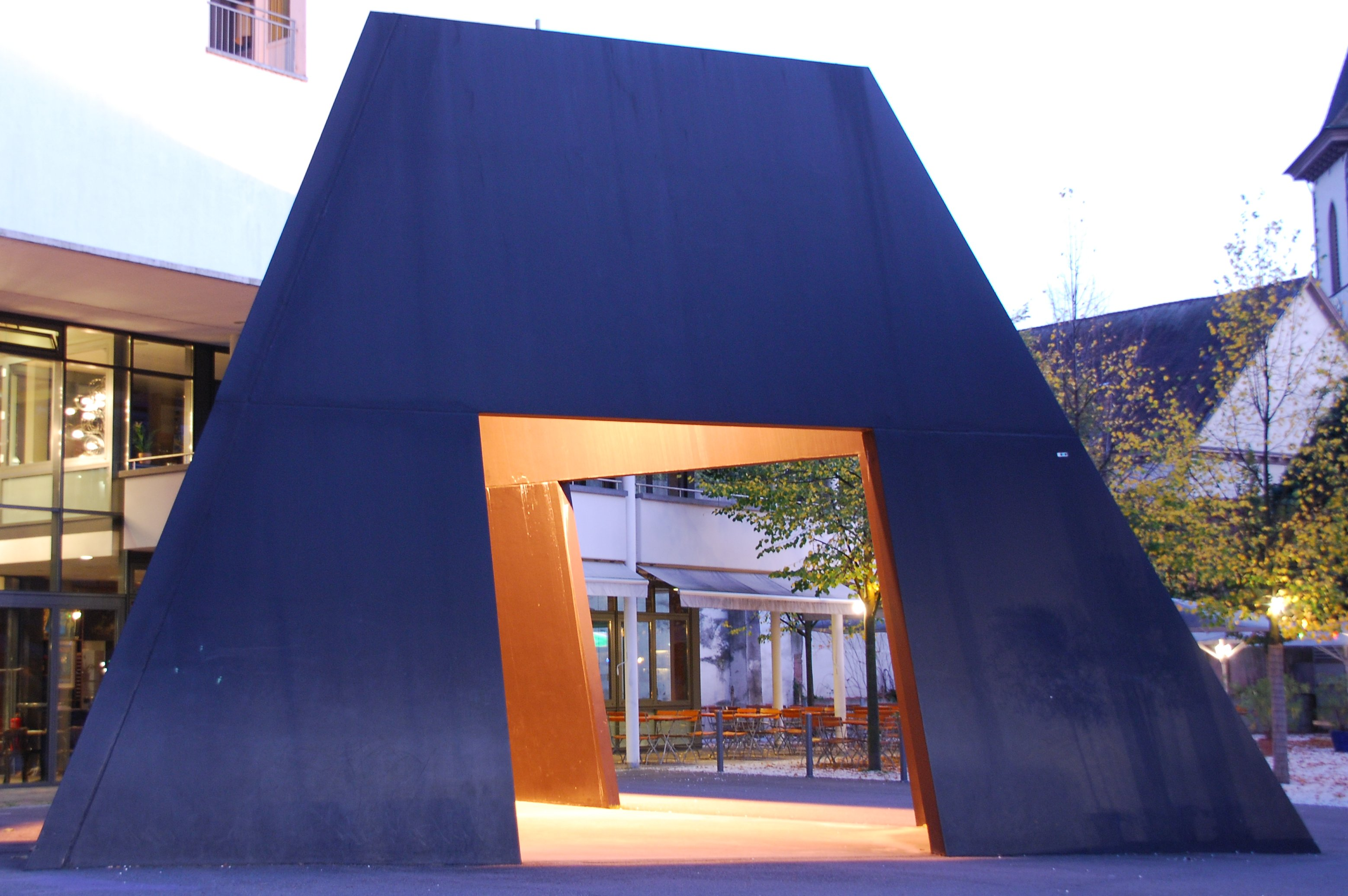 (für die GNU FDL) (Original text: Skulptur „Truncated Pyramid Room“ von Bruce Naumann, Ort: Burghof in Lörrach)